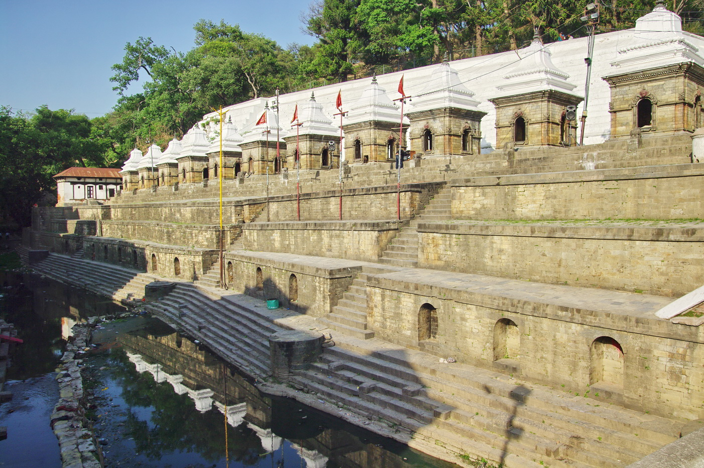 Terrasse Tempelanlage Pashupatinath